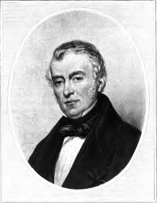 Le_comte_de_Rambuteau,d'après_Court,_1838